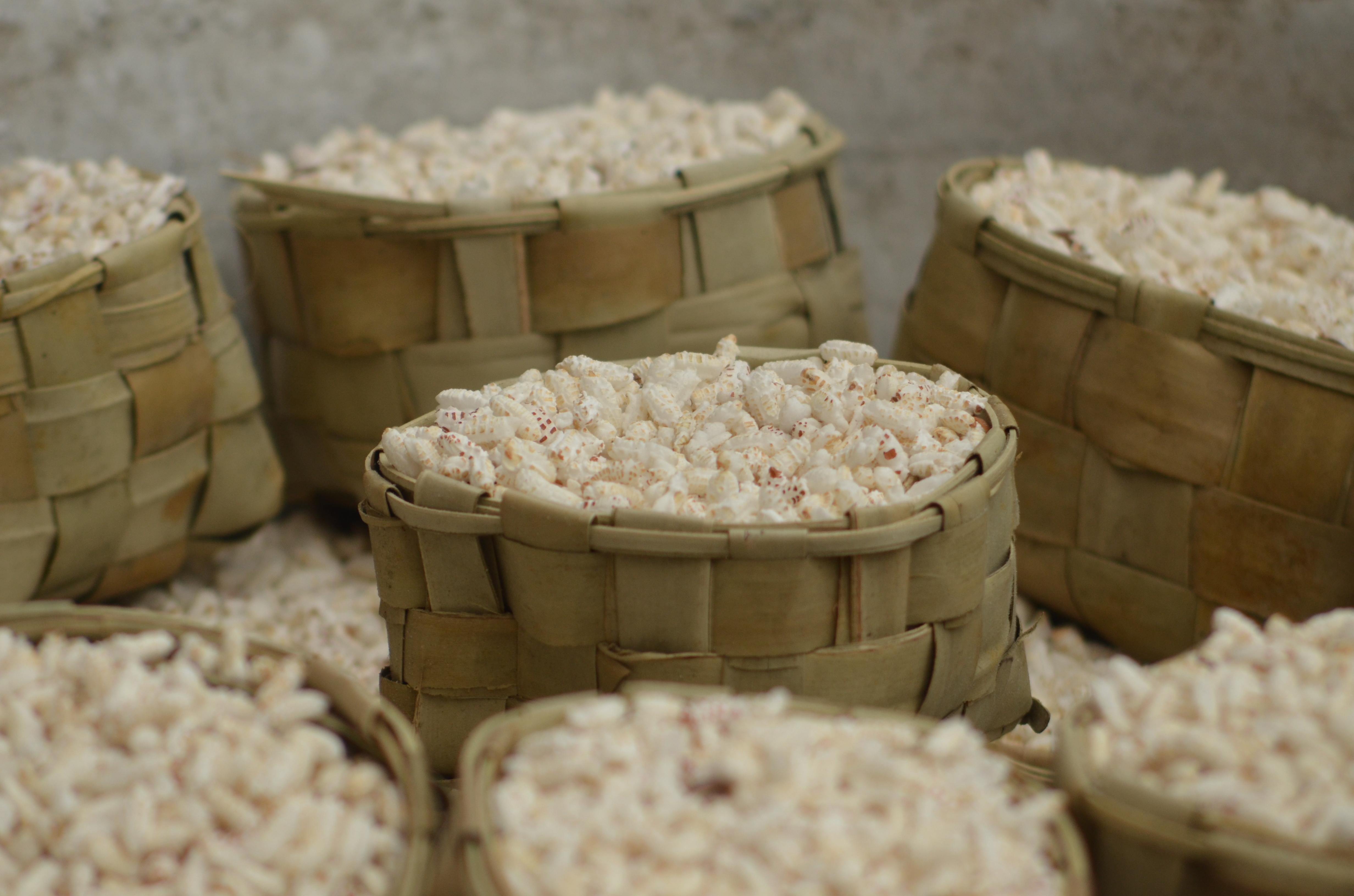 ଓଡ଼ିଆ: ବଡ଼ଦାଣ୍ଡରେ ବିକ୍ରି ହେଉଥିବା ଖଇ ବା ଲିଆ ।